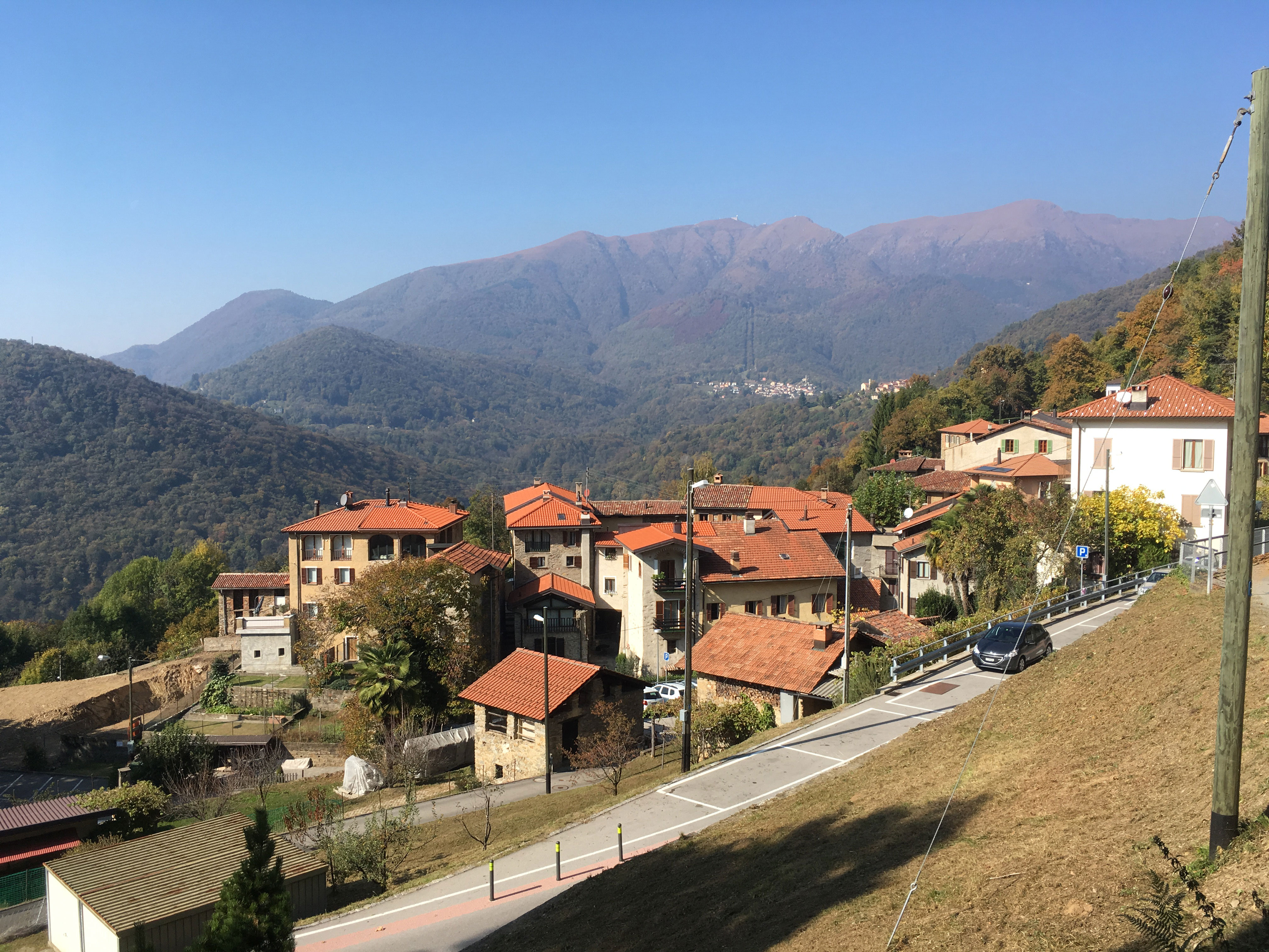 Blick auf die ehemalige politische Gemeinde Iseo TI, heute Bioggio, im Jahr 2017, mit dem Monte Lema im Hintergrund.